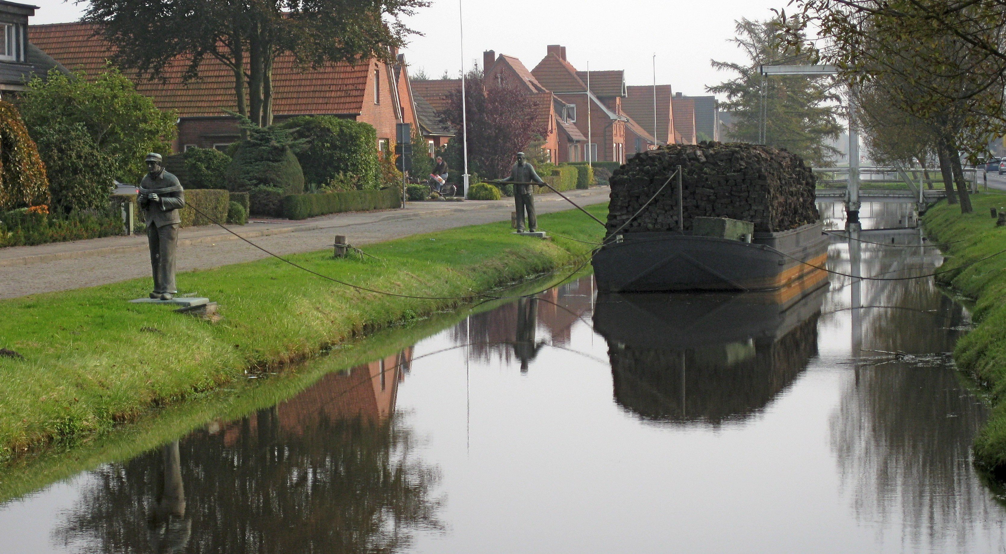 Torfschiff auf dem Splittingkanal in Papenburg bei der von Velen-Anlage wird getreidelt